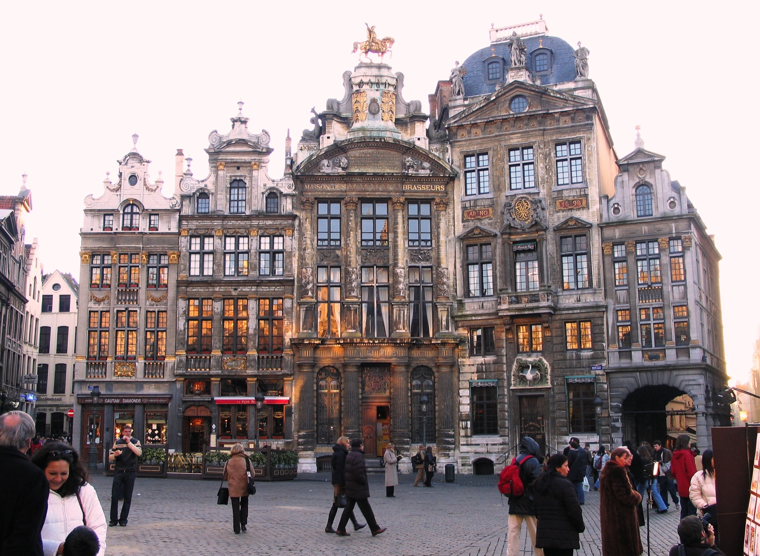 Enkele gildenhuizen op de Grote Markt in Brussel - eigen foto